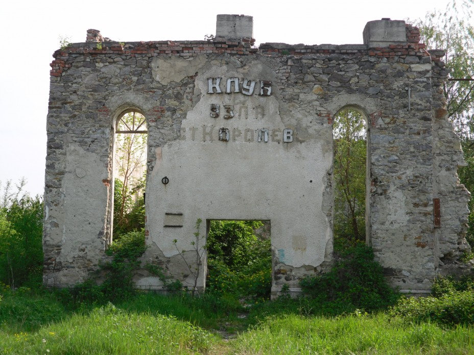 Руины Новой синагоги в Королево (Закарпатье), возведенной в 1920-х годах для зажиточных евреев (в отличии от Старой синагоги, где молились бодные евреи села).